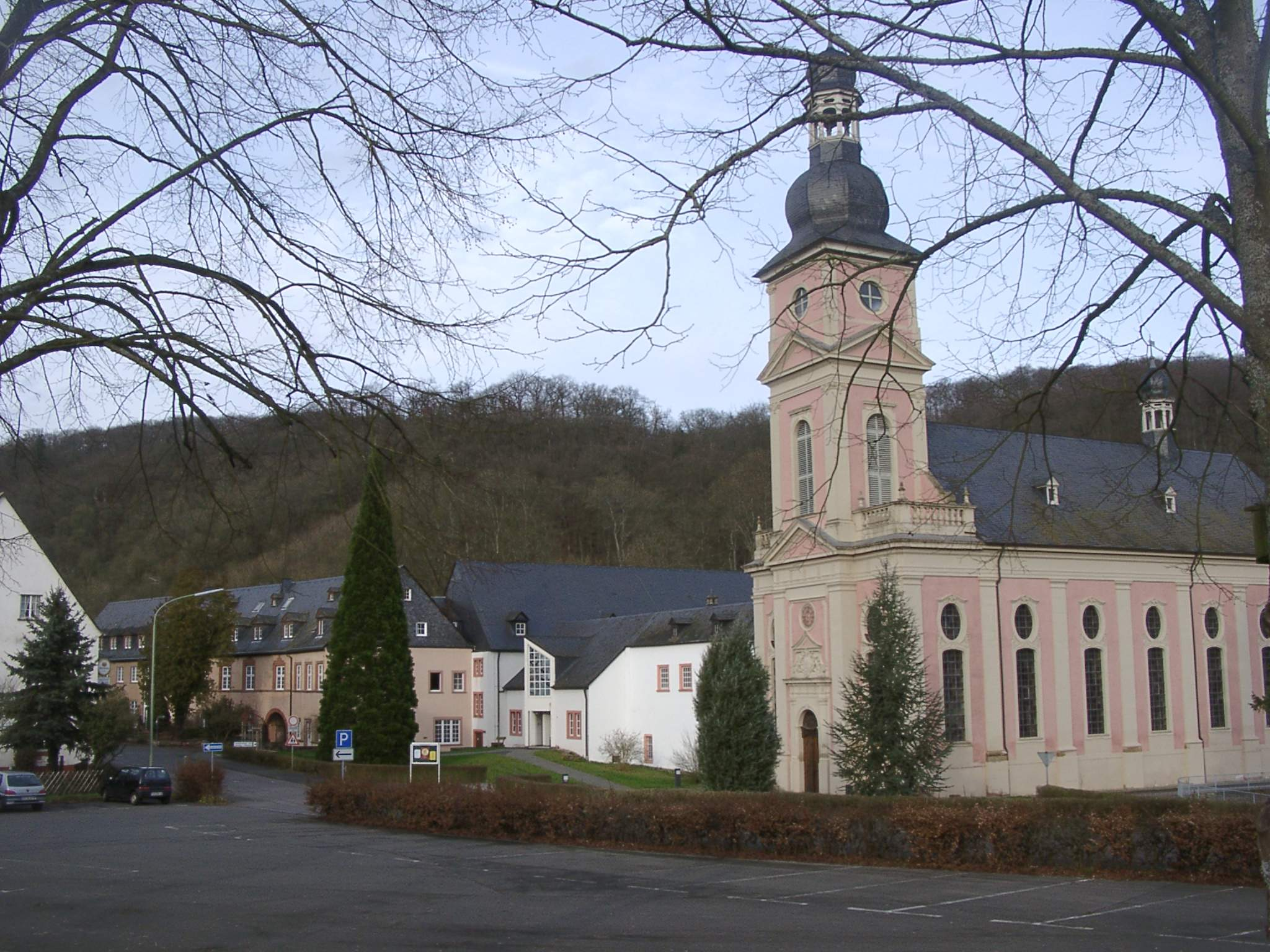 Springiersbach Monastery - Kloster Springiersbach